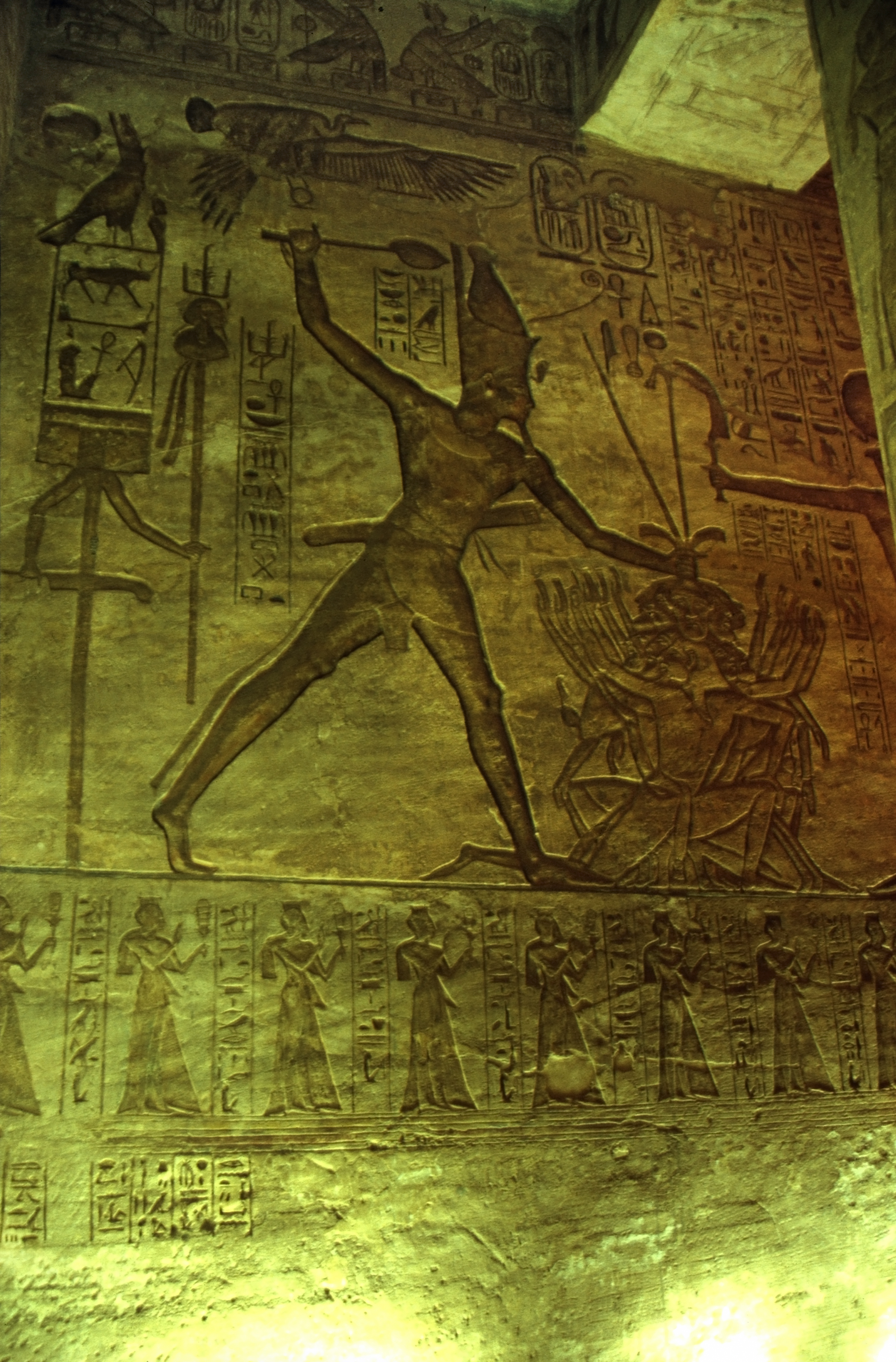 Relief in der Großen Pfeilerhalle (Pronaos) des Großen Tempels von Abu Simbel: Ramses II. tötet Kriegsgefangenen (vermutlich bei der Schlacht bei Qadeš (auch: Kadesch).